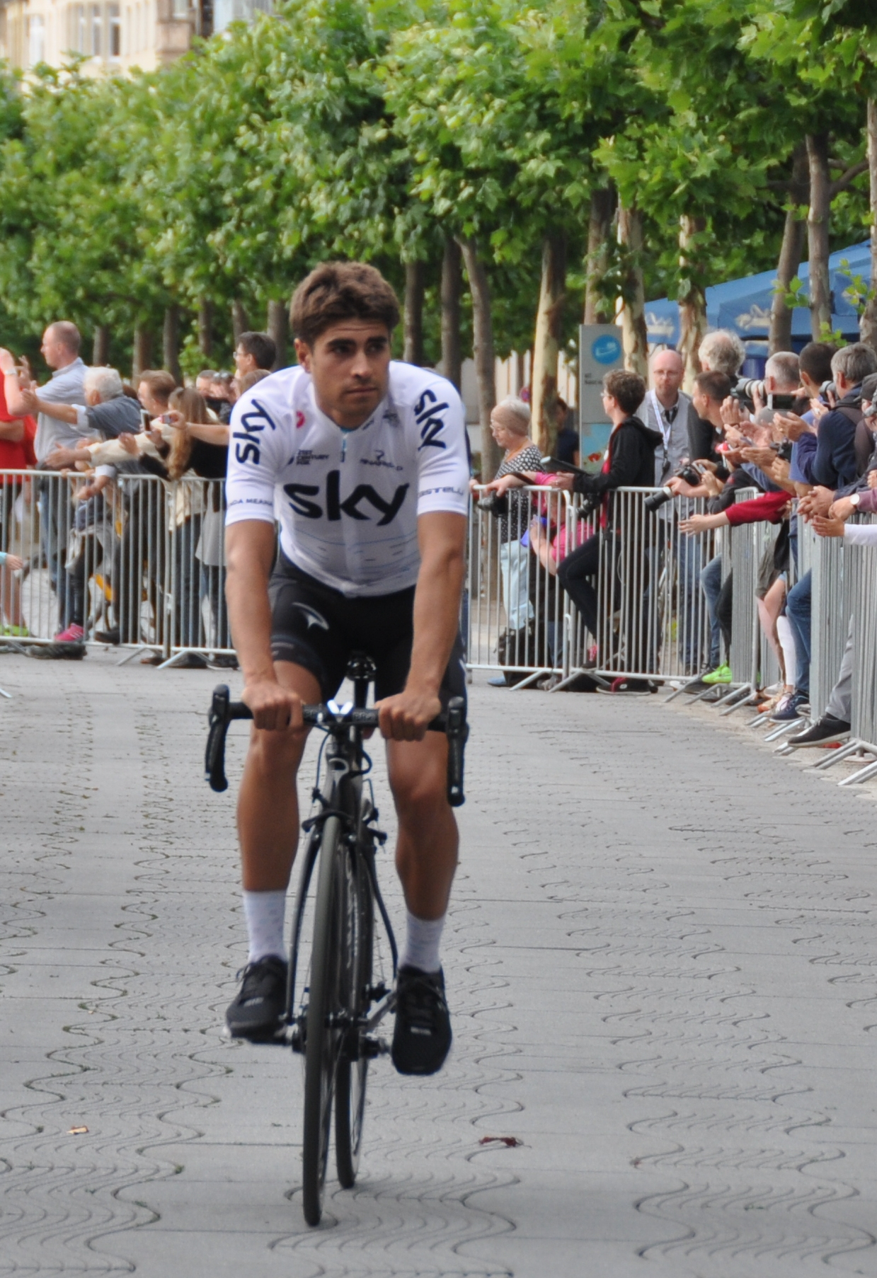 Mikel Landa, spanischer Radrennfahrer